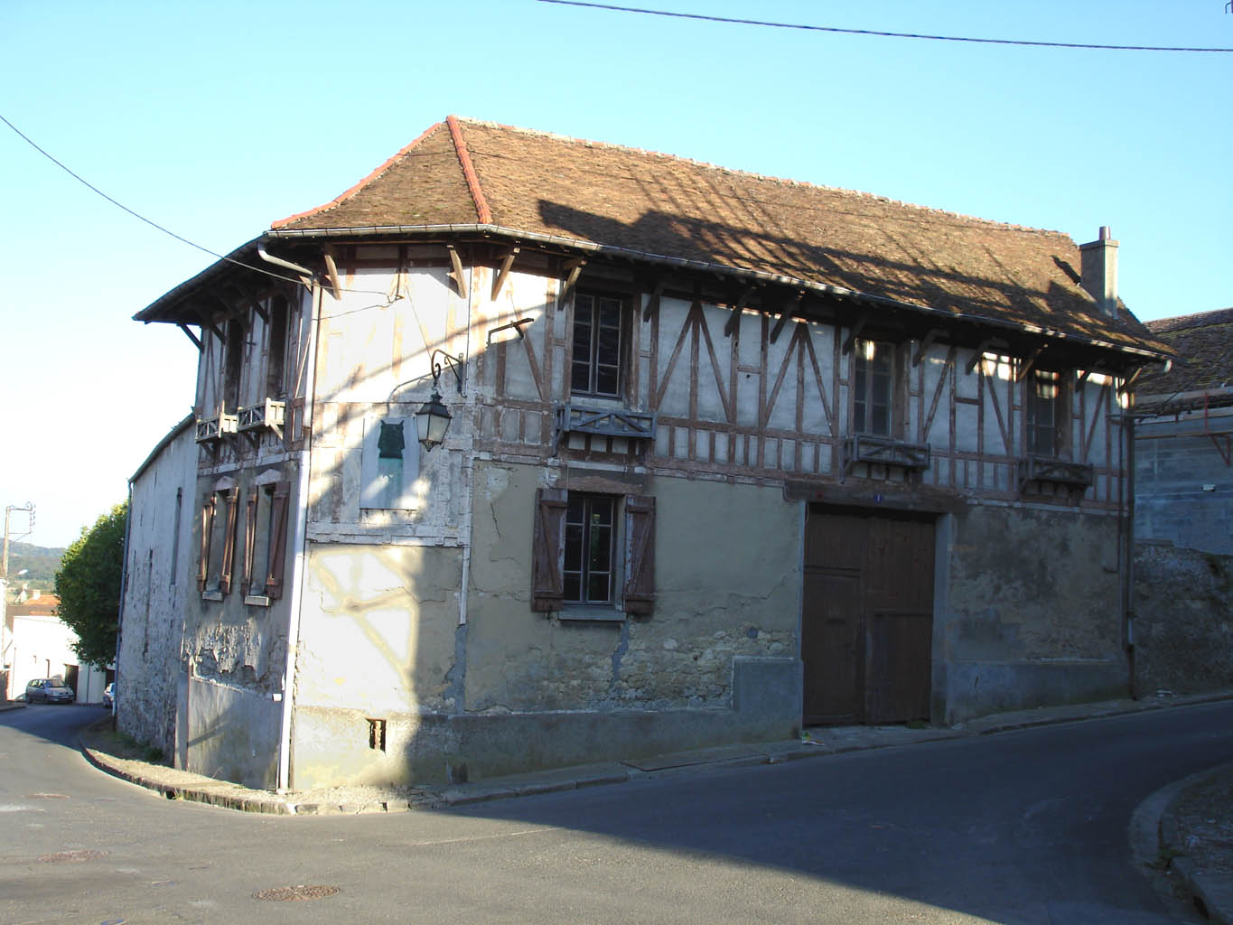 Maison de Benjamin Godard à Villiers-Adam (Val-d'Oise), France Rue Benjamin-Godard Septembre 2007 Photo personnelle (own work) de Clicsouris